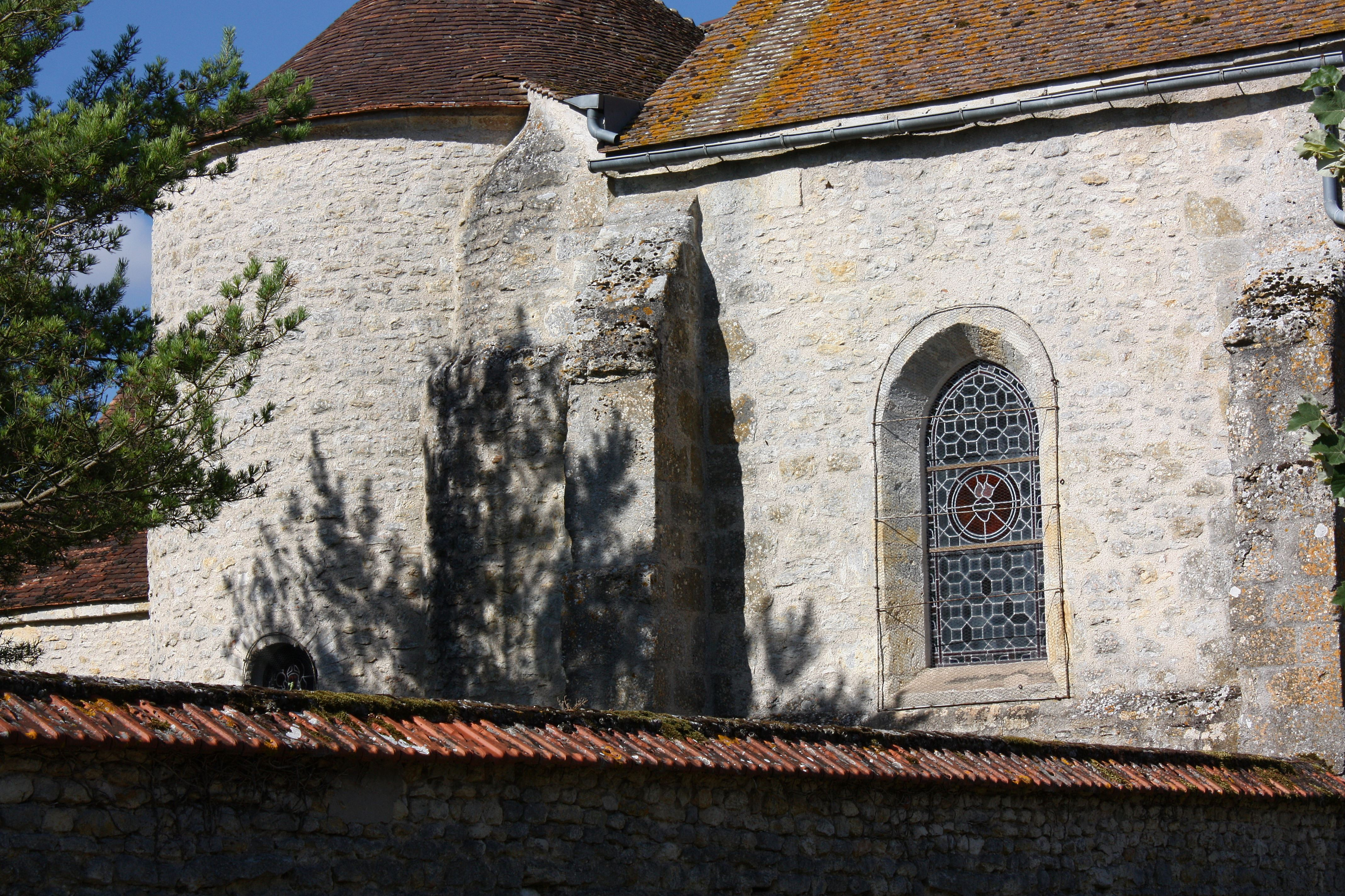 Ondreville-sur-Essonne - Eglise Saint-Léger Vue du Nord-Est.